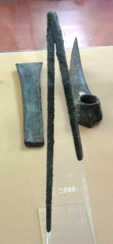 compasso nuragico, strumenti di scultura. Museo archeologico nazionale di Cagliari.